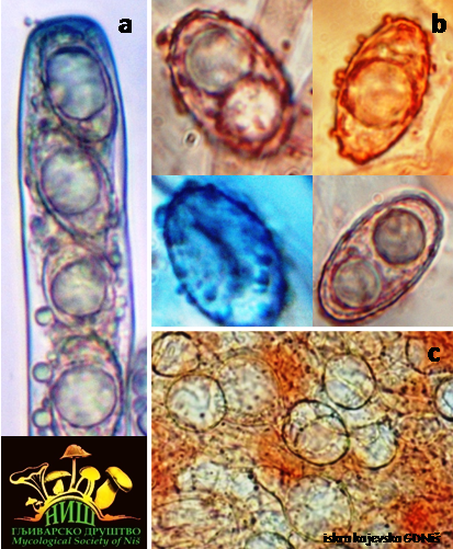 a. Аскус са спорама. b. Споре. c. Ектални ексципулум.